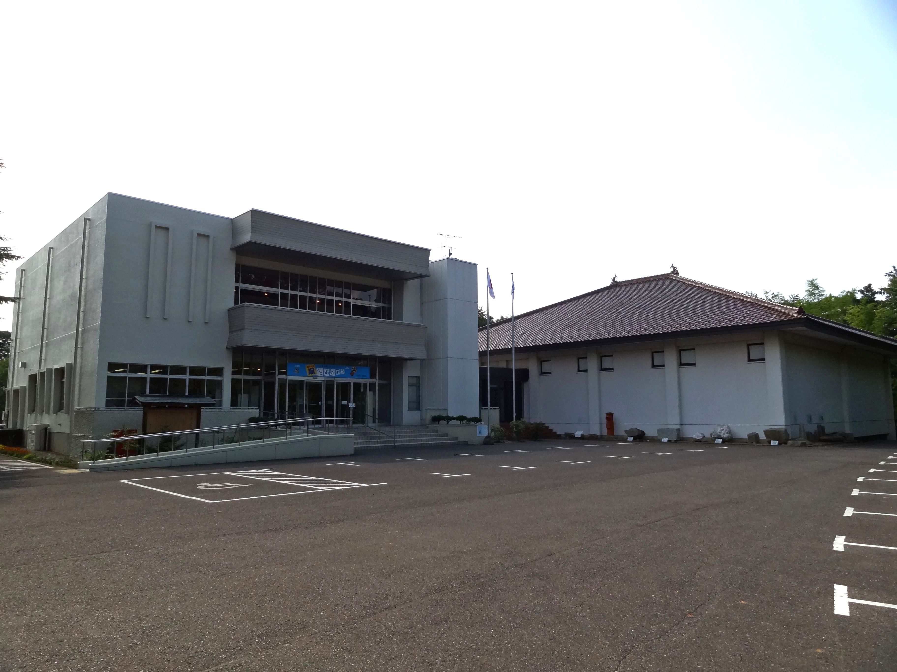 須賀川市立博物館